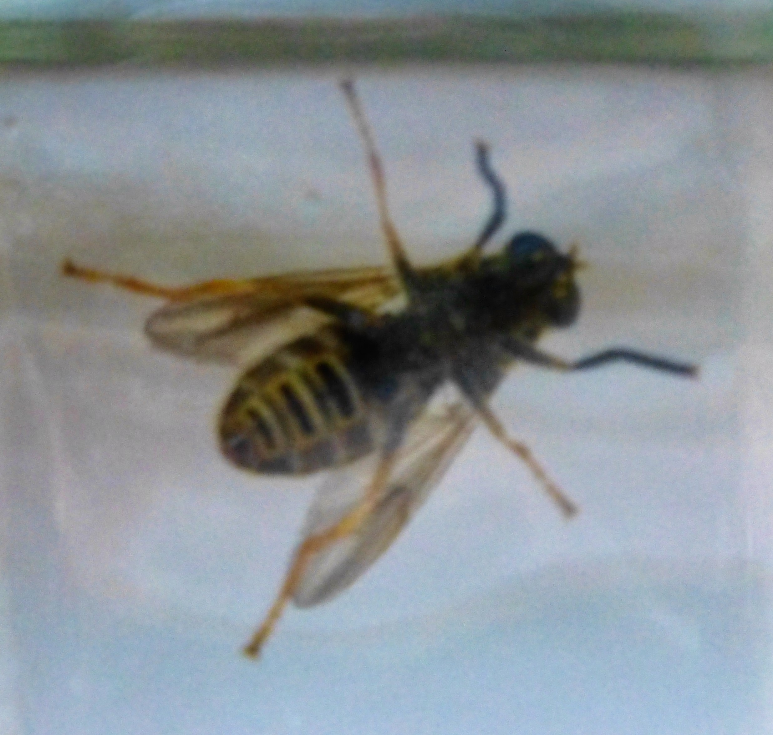 Temnostoma vespiforme vue ventrale Mons, Hainaut Belgique